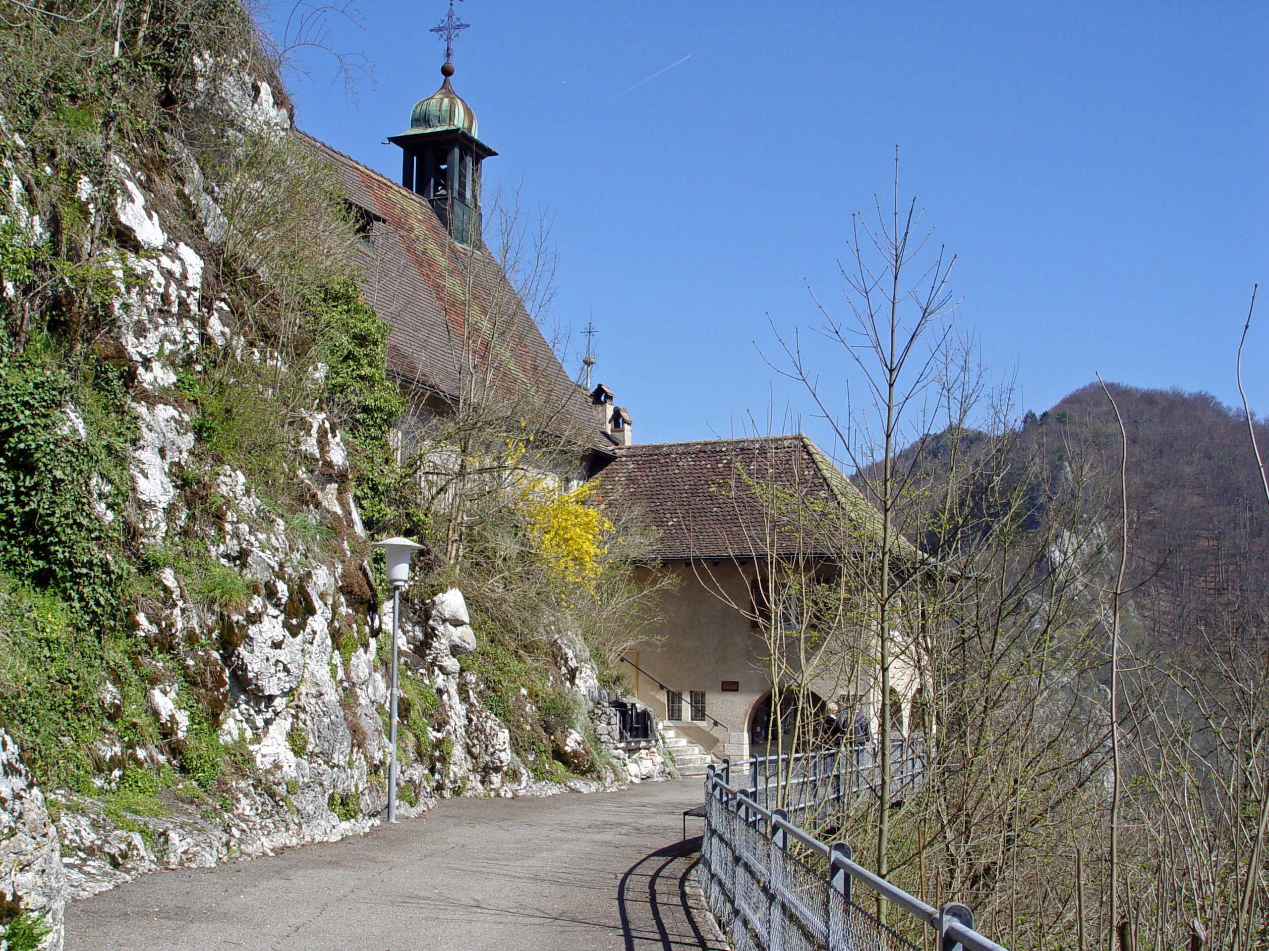 Kapelle Du Vorbourg bei Delemont